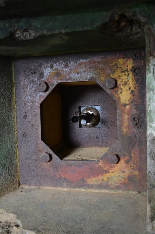 Créneau type A pour FM 24/29 avec le FM monté sur rotule RB, avec un épiscope en place. Embrasure et son arme du bloc 2 de l'ouvrage de la Ferté.